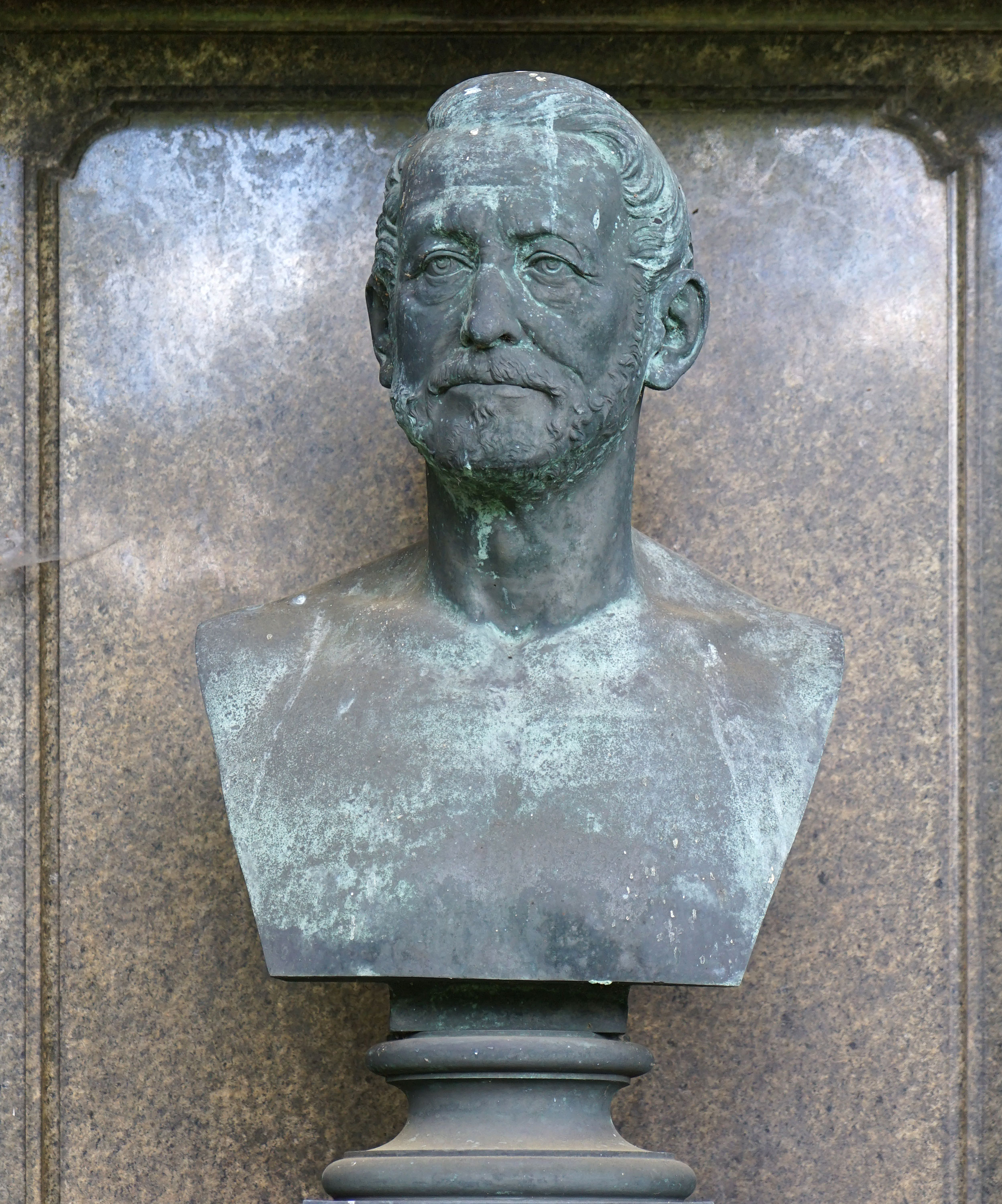 Grabmal Familie Christian Heinrich Wätjen in Bremen - Büste, Riensberger Friedhof RiensDas abgebildete Objekt ist ein geschütztes Kulturdenkmal in der Freien Hansestadt Bremen, mit der Nr. 1948,T066 beim Landesamt für Denkmalpflege registriert.